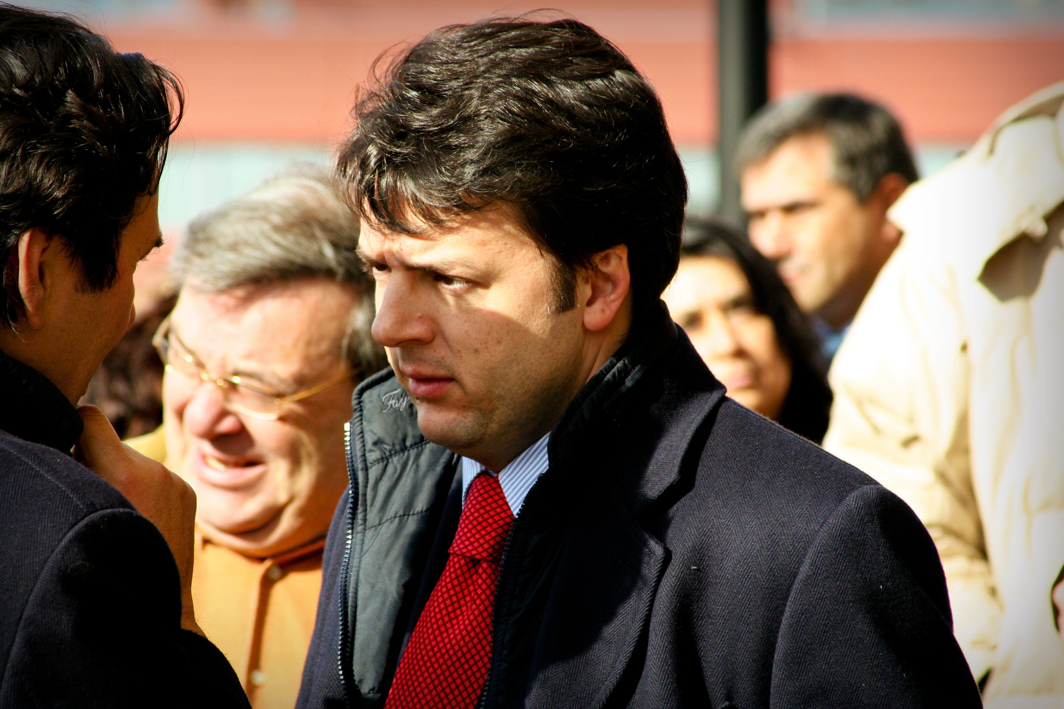 Matteo Renzi, Presidente della Provincia di Firenze, all'inaugurazione dell'incubatore per le imprese di Sesto Fiorentino.